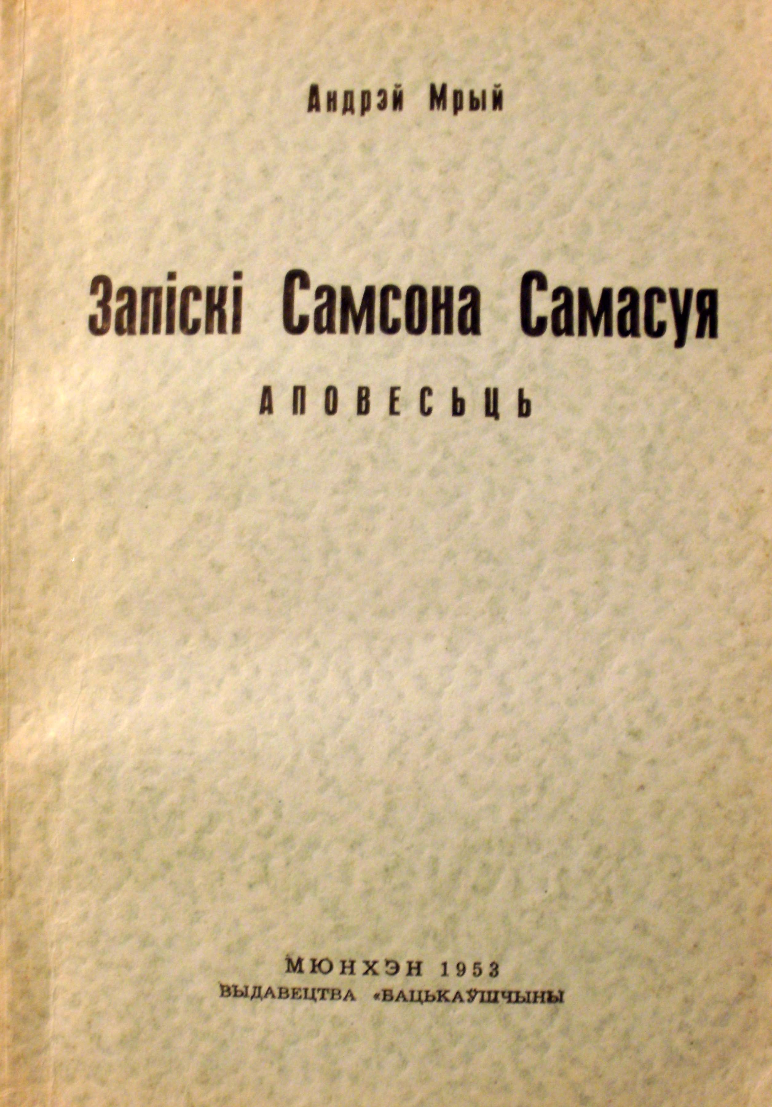 Беларуская (тарашкевіца): Андрэй Мрый - Запіскі Самсона Самасуя, выданьне 1953 году, Мюнхен